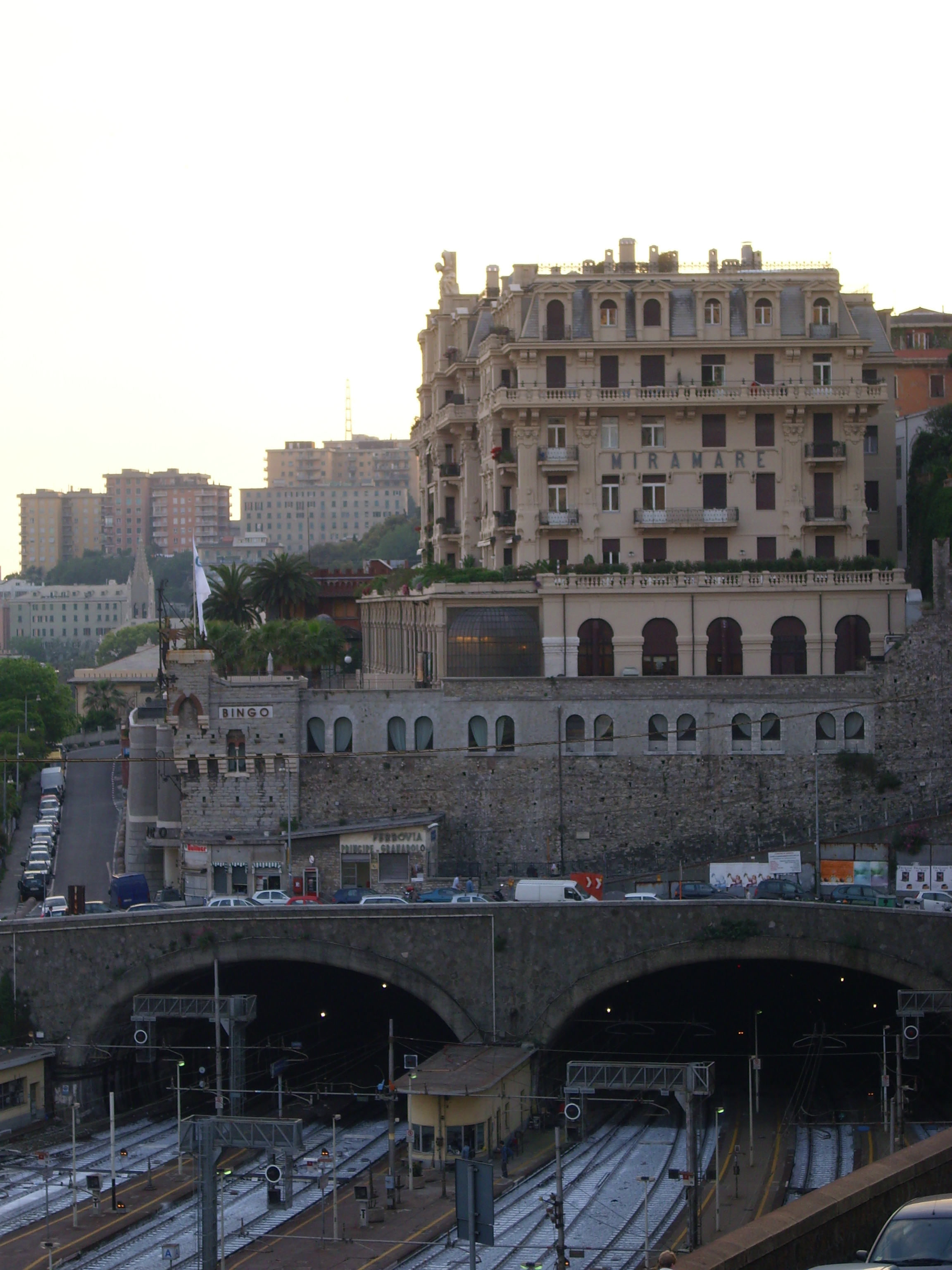 Il Grand Hotel Miramare a Genova. In basso le gallerie ferroviarie che sbucano nella stazione di Genova Piazza Principe.